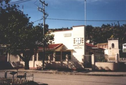 Sitz der Verwaltung des Subdistrikts (Verwaltungsamt) Baucau